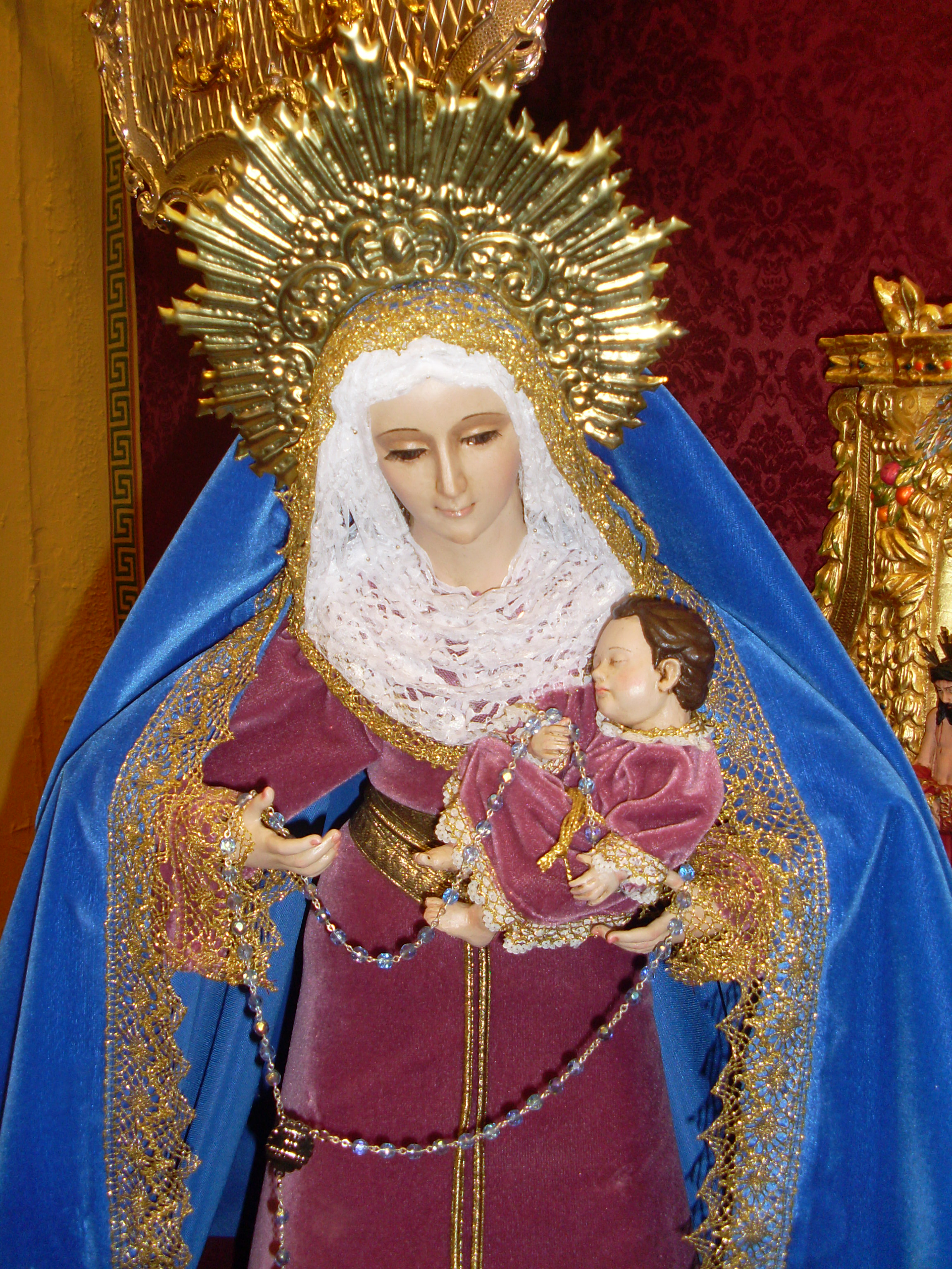 Pieza imaginera.